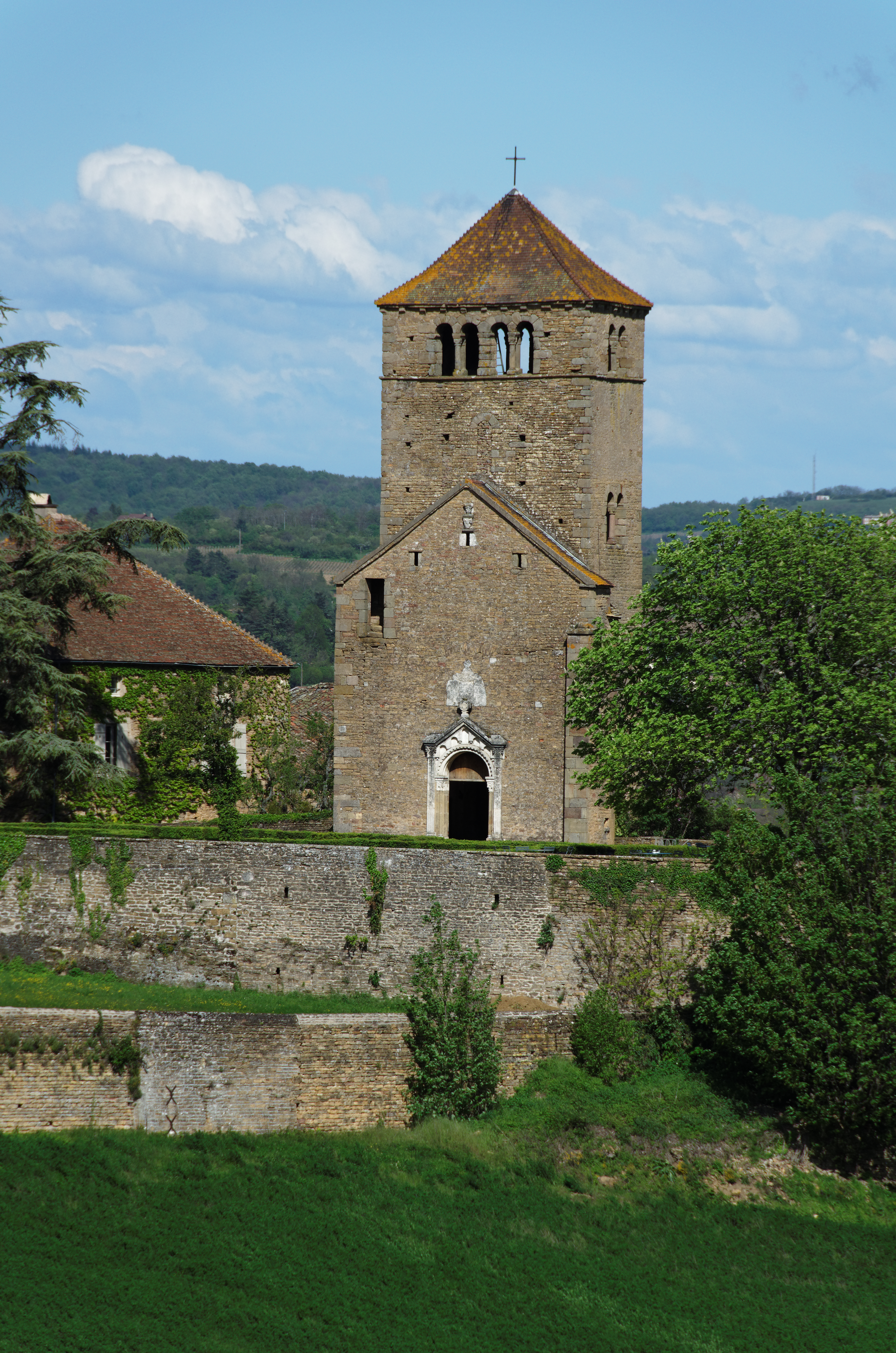 Clocher de l'église du Château de Pierreclos, Saône et Loire (71), France. XIIe siècle.